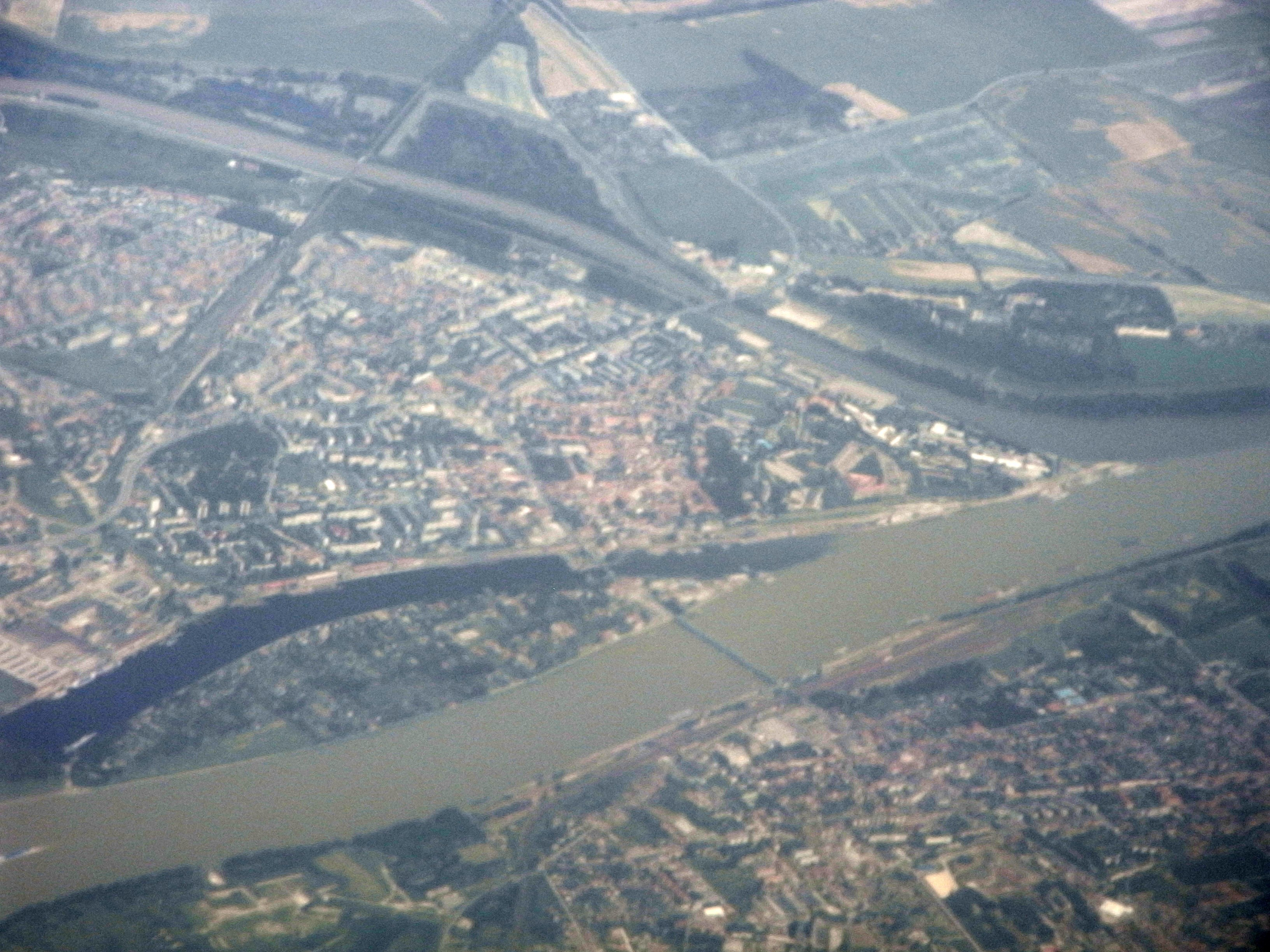 Luftaufnahme von Komárom-Komárno an der Mündung der Waag in die Donau. Das dunklere Wasser der Waag ist deutlich zu unterscheiden.